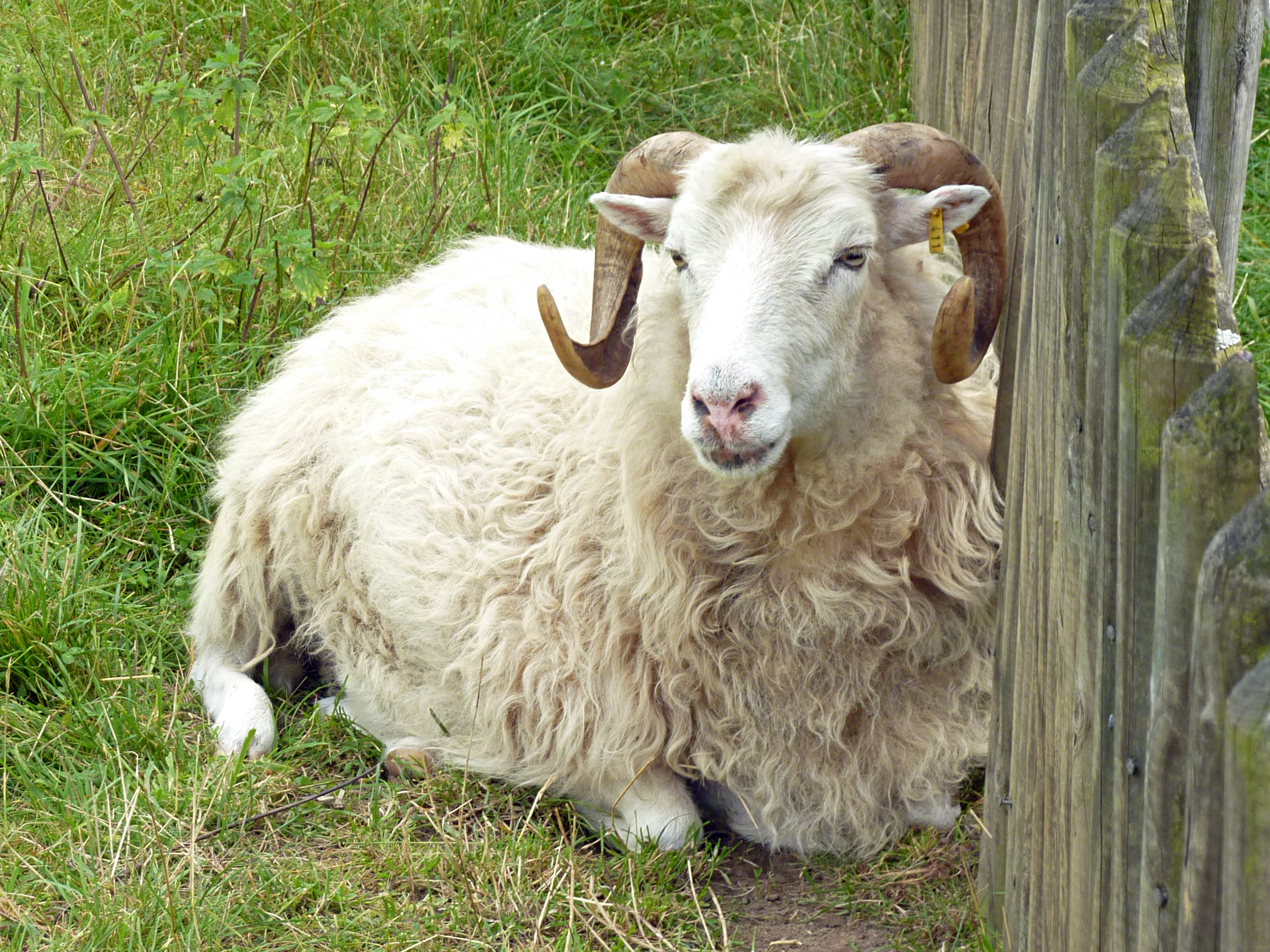 Skudde im Museumsdorf Düppel, Berlin-Zehlendorf, Deutschland.